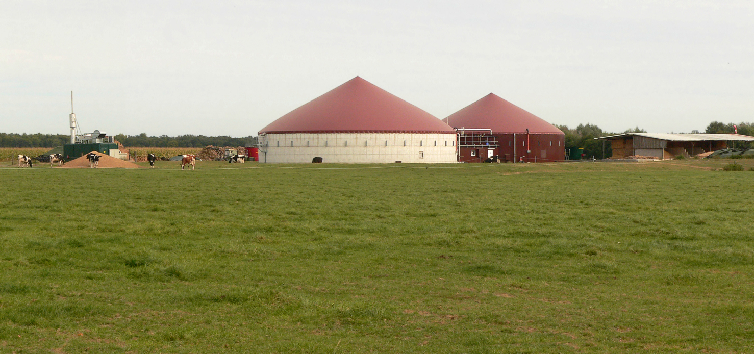 Fundstelle des Urnengräberfeldes Hohnhorst etwa in Höhe der nach der Ausgrabung erbauten Silos